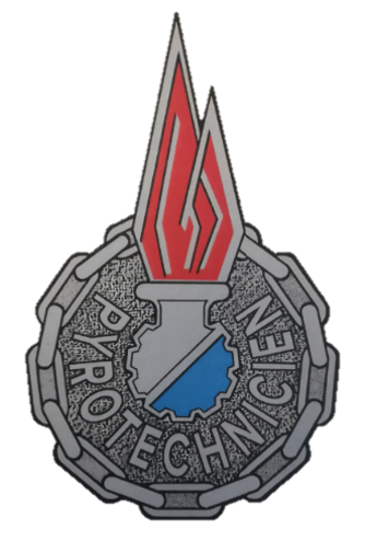 Insigne des pyrotechnicien des armées